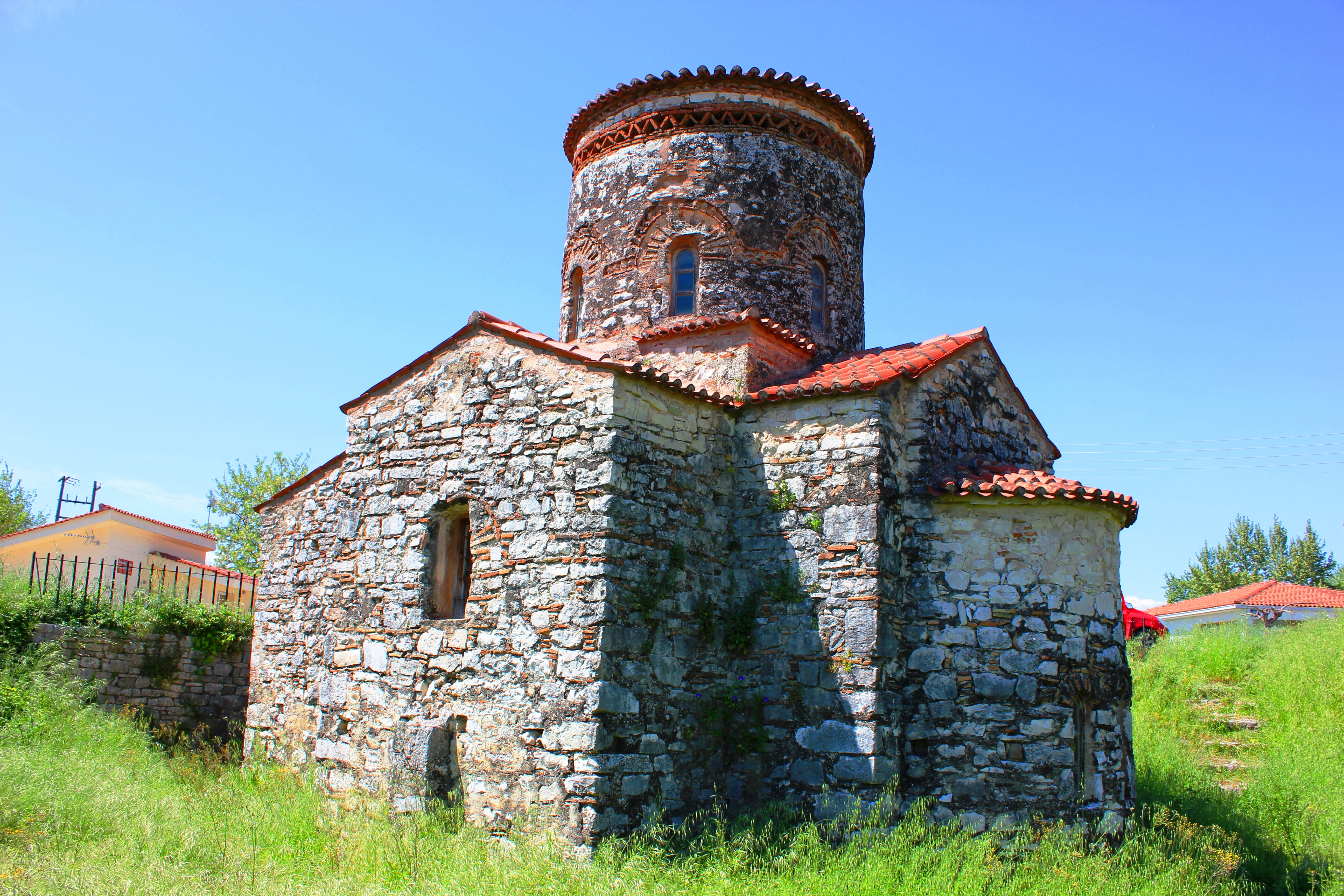 O Αγιος Βασίλειος Γεφυριού Αρτας